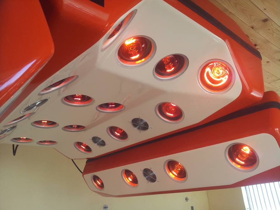 Polyester Solarium mit eingebauten Lüftern